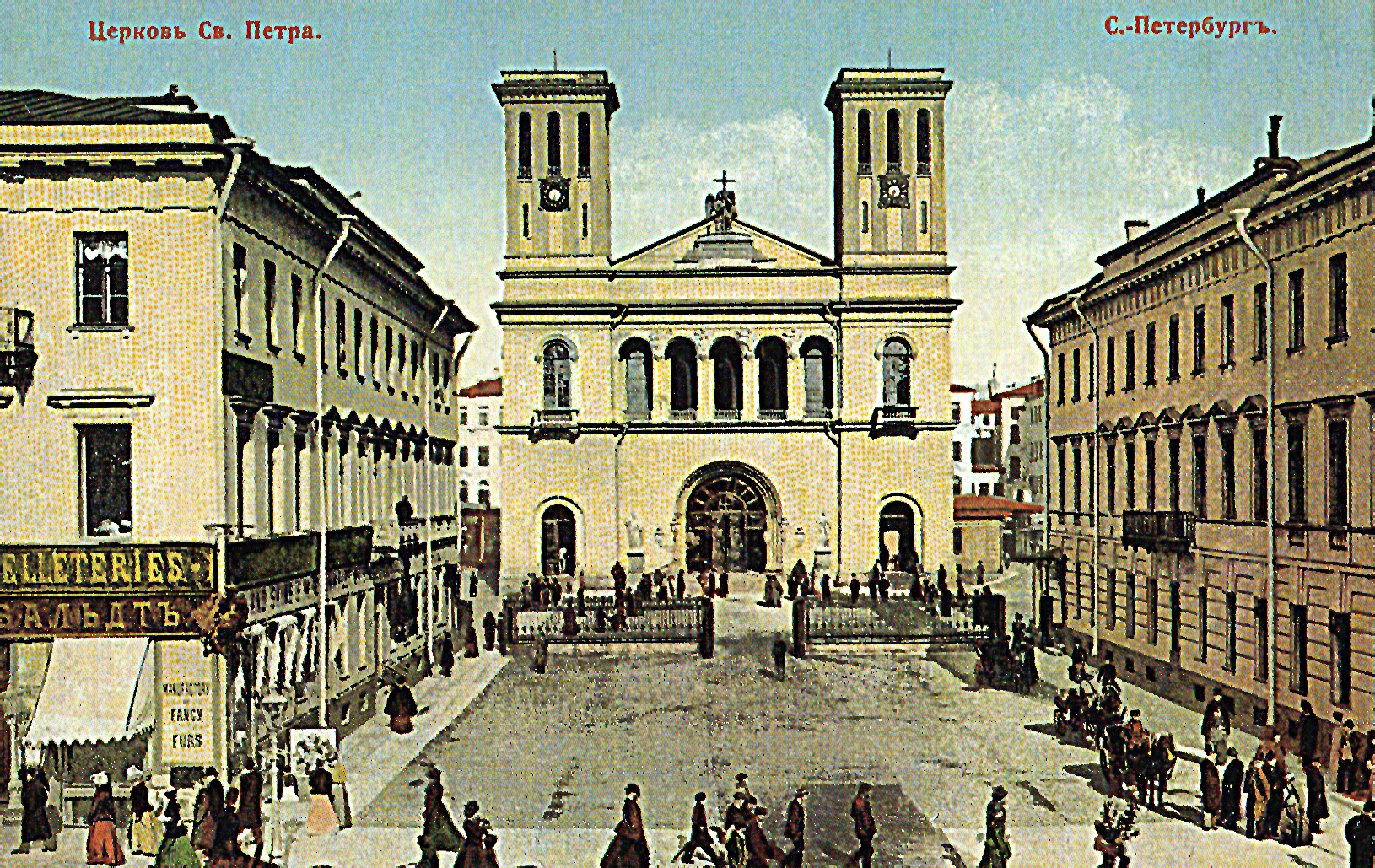 Nevsky_prospect_22--24